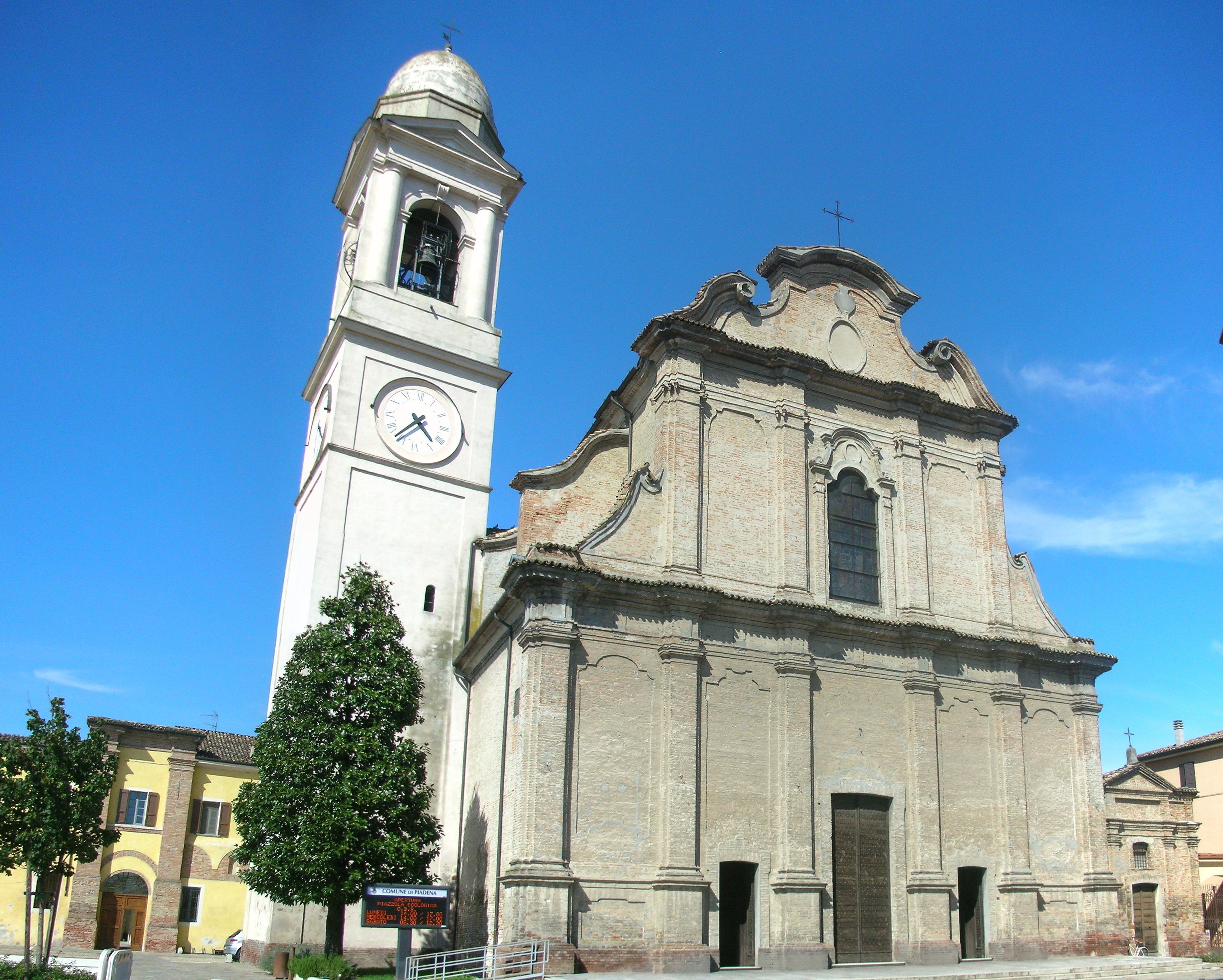 Chiesa Parrocchiale